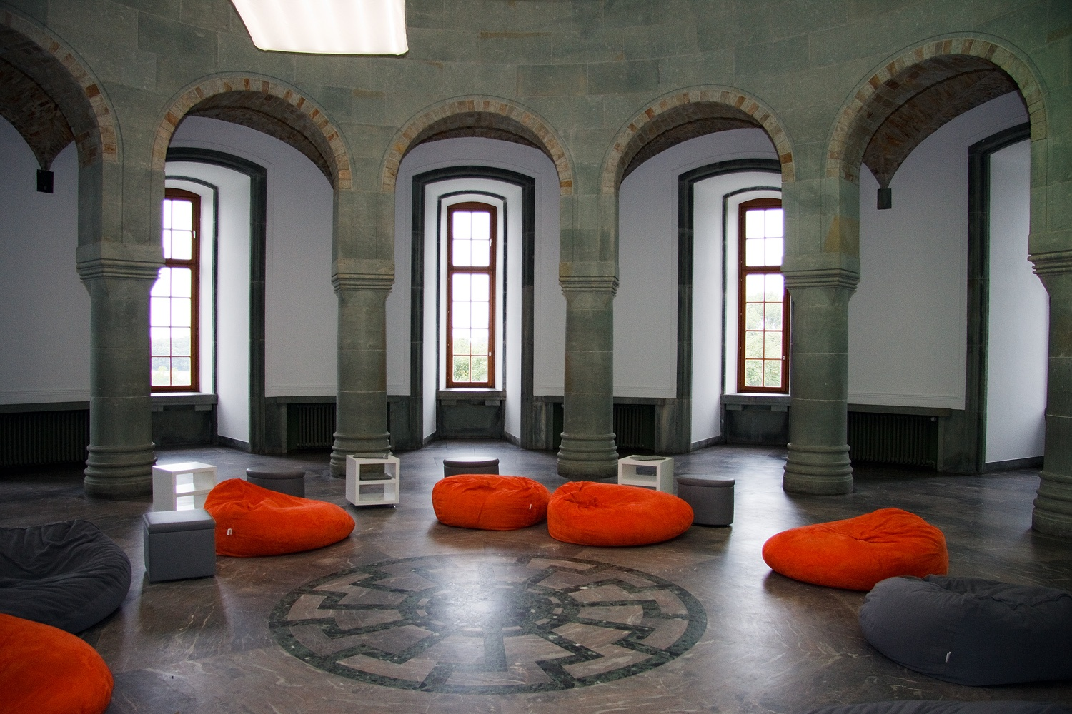 Deutschland einzige Dreiecksburg, Datum/Uhrzeit: 22.08.2010 12:14:29